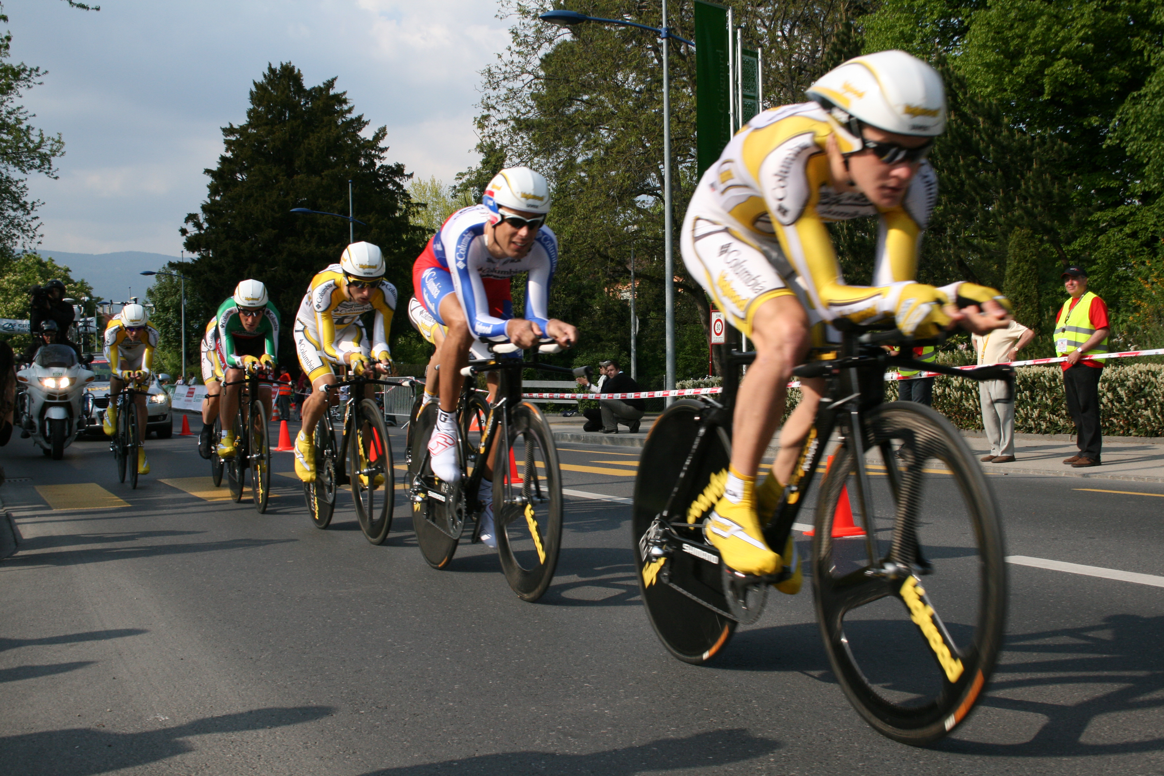 Equipe cycliste Columbia lors du contre la montre par équipe du Tour de Romandie 2009.